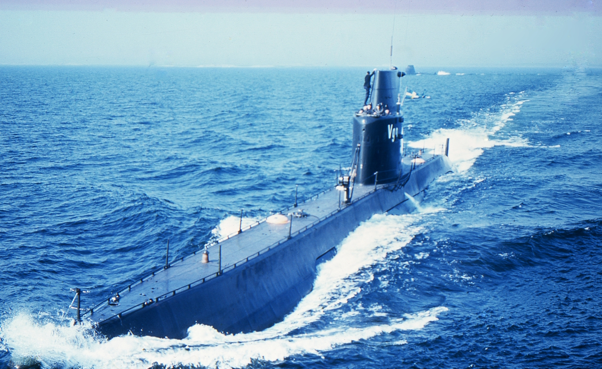 Den svenska ubåten HMS Vargen.